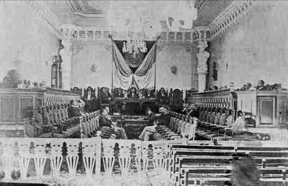 Asamblea Nacional Legislativa de Guatemala. Fotografía de 1907.